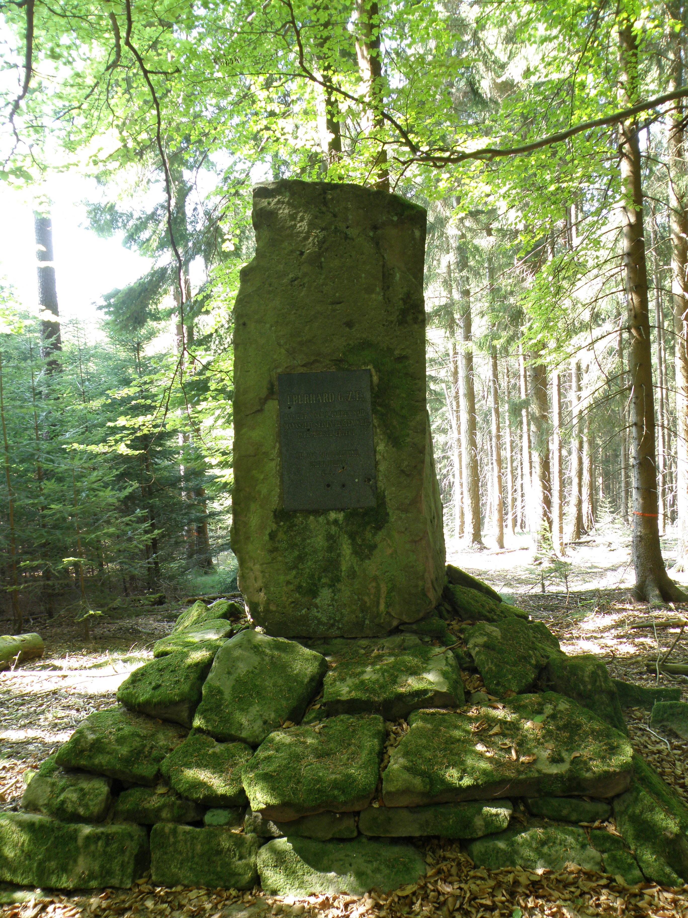 Gedenkstein an Graf Eberhard XV. zu Erbach-Erbach als Jäger